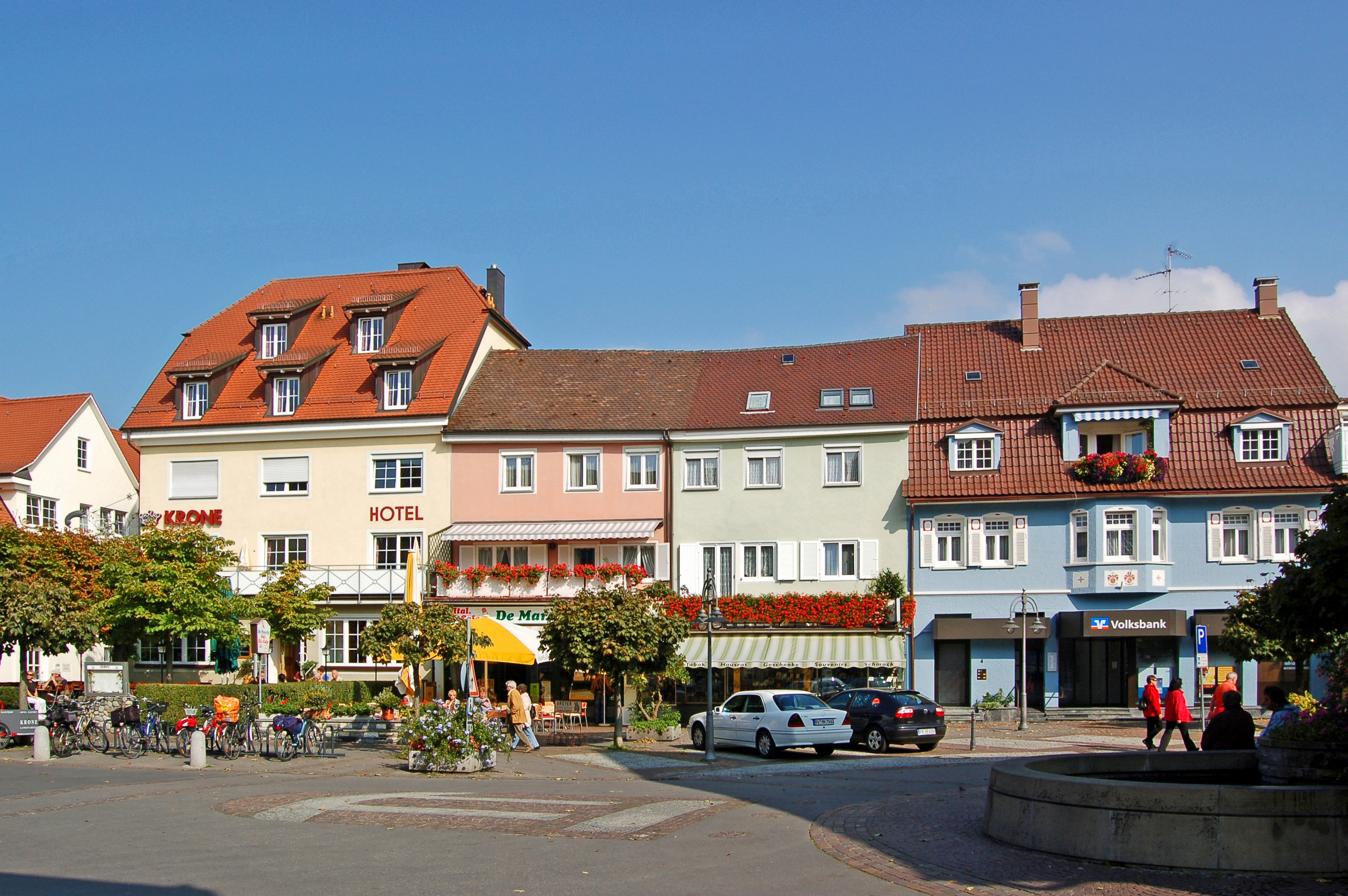 Restaurierte Häuserzeile am Marktplatz von Langenargen am Bodensee.